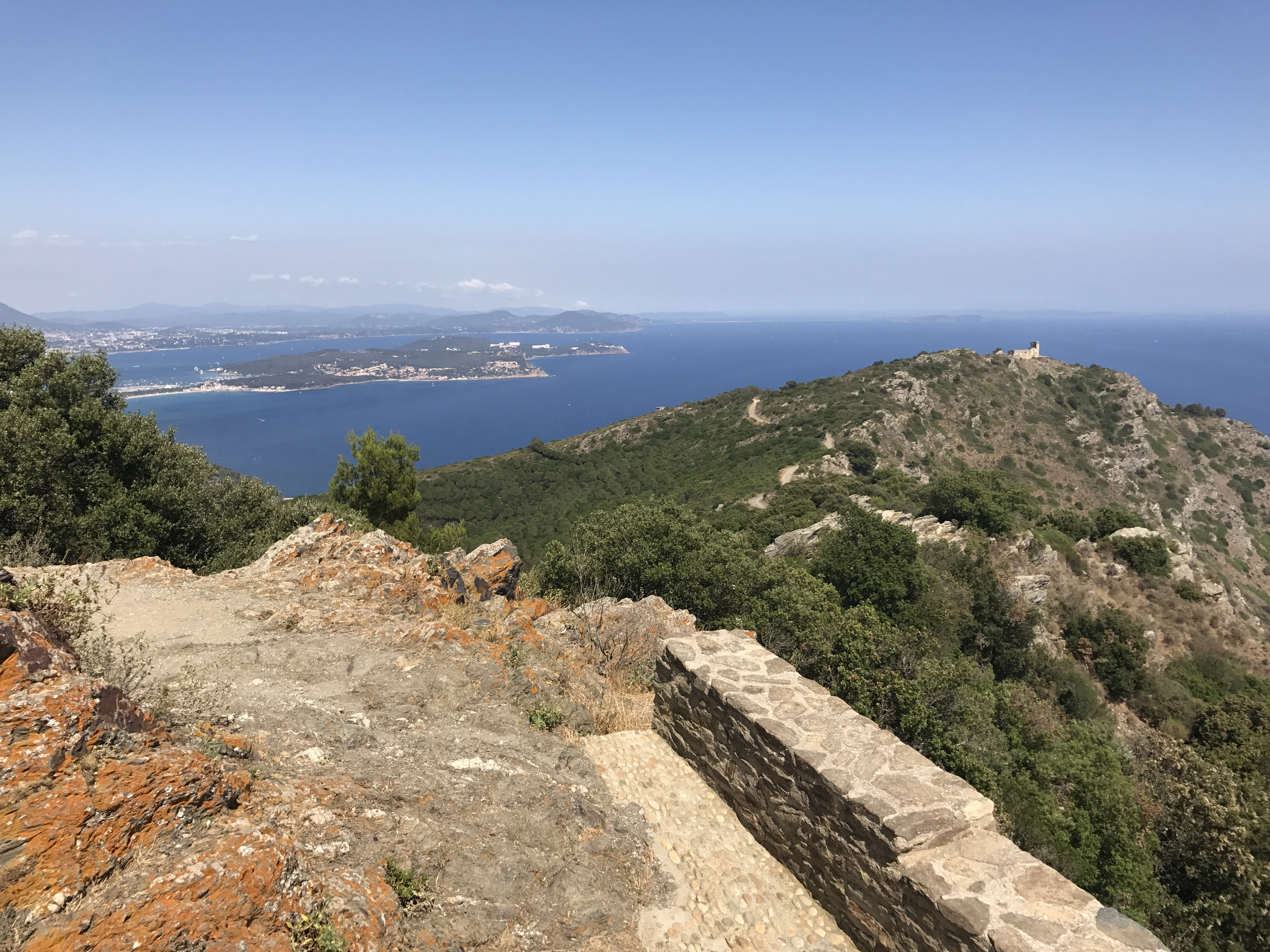 Belvédère de la chapelle Notre-Dame-du-Mai, Six-Fours-les-Plages.